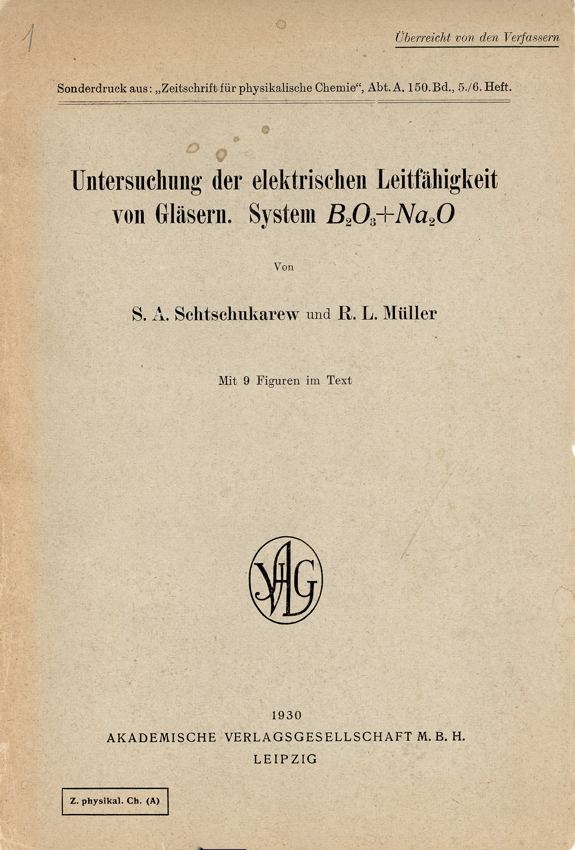 Обложка оттиска статьи из журнала «Akademische Verlagesgesellschaft M. B. H.», Leipzig: 1930